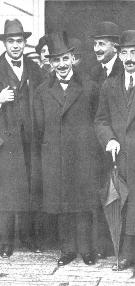 Fotografía que muestra al político español Melquíades Álvarez abandonando el Palacio Real después de ser consultado por el rey Alfonso XIII con motivo de la crisis que supuso la finalización del primer gobierno de Eduardo Dato. Fue la primera vez que el rey llamó a consultas al jefe del Partido Reformista.